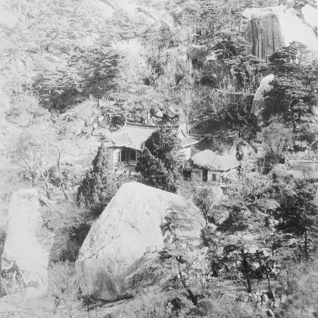 학도암의 옛날 모습